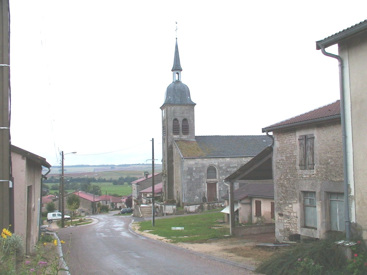 Vue de Bouquemont (dep. de la Meuse), rue principale Photo prise par F5ZV en automne 2005 Licensing Catégorie:Image de commune de la Meuse